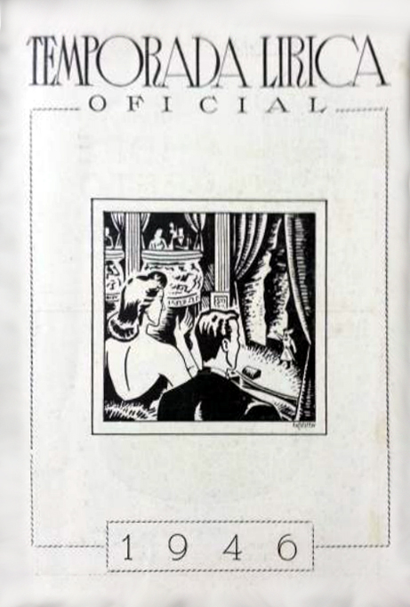 Capa da programação da temporada lírica de 1946 do Orfeão Rio-Grandense.